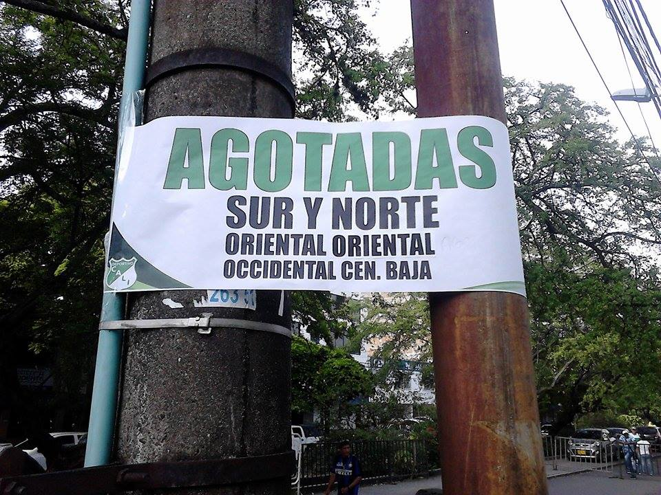 Boletas agotadas de sur, norte y oriental para el primer partido de la Final de la Liga Águila 2015.